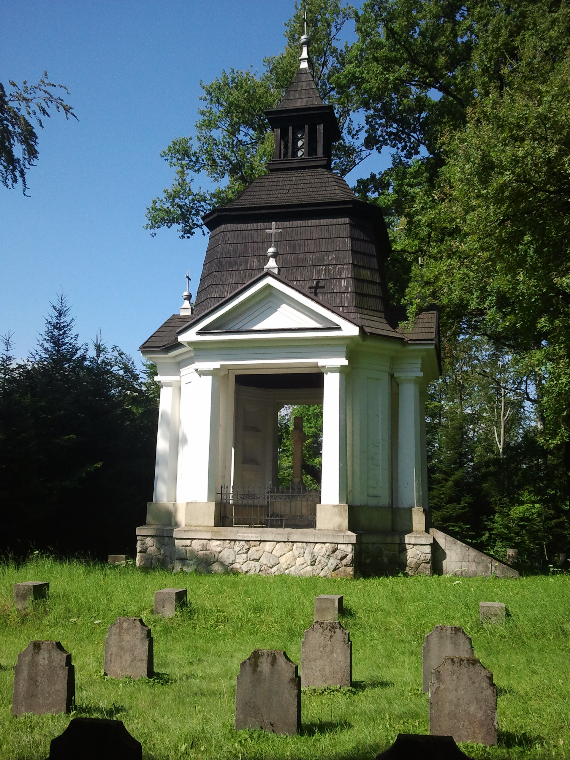 Lubinka, kaplica, 1916